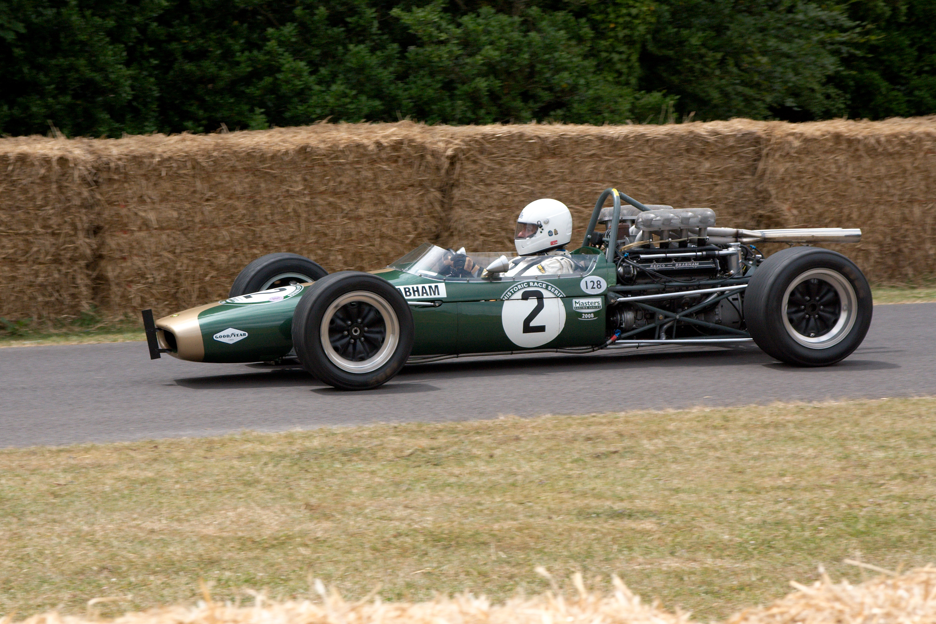 Brabham Repco BT24